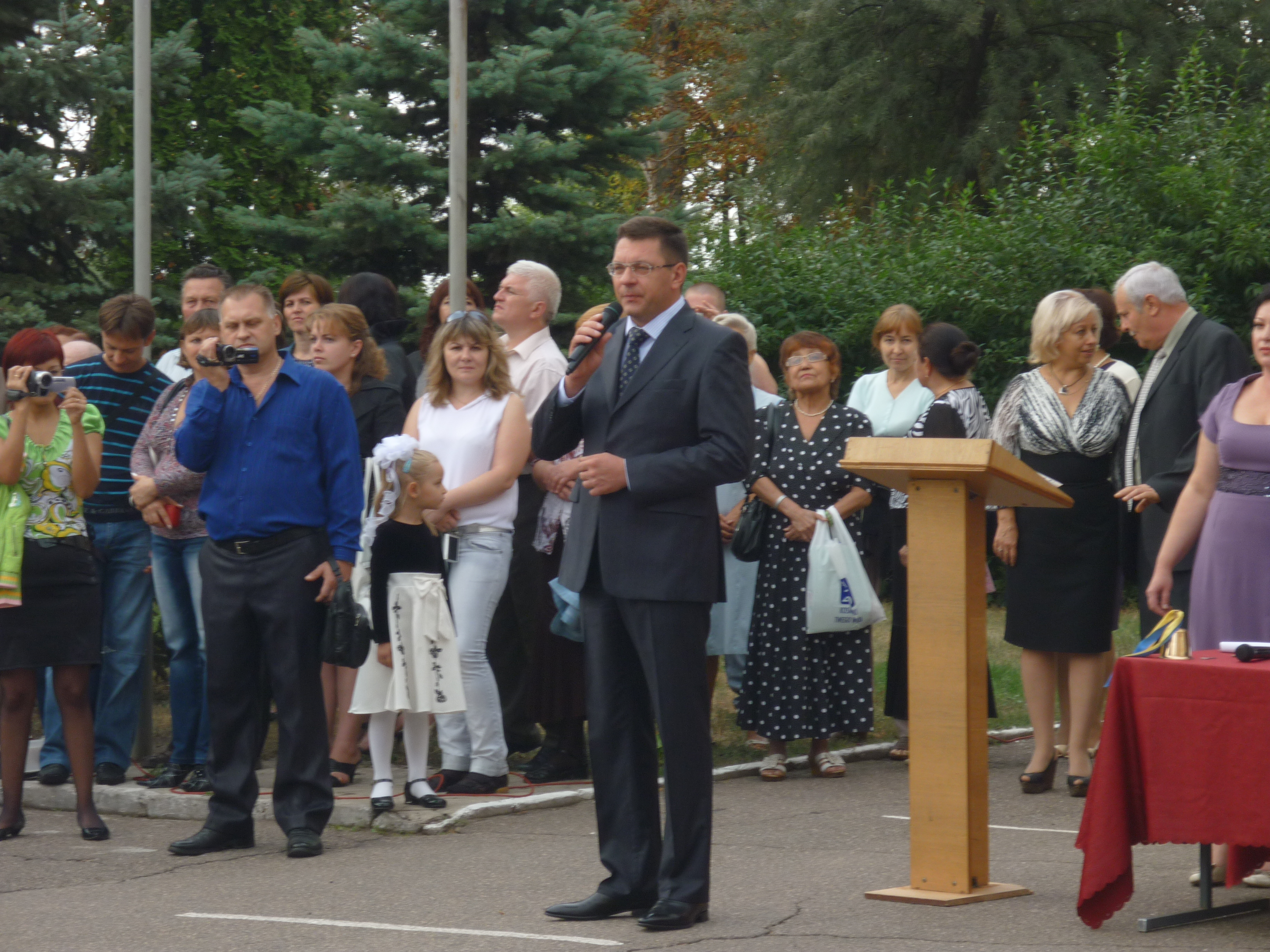 мер міста Черкаси С.О.Одарич присутній на першому дзвонику в Черкаській СШ№13